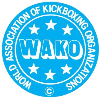 Reglamentacion WAKO World Association of Kickboxing Organizations La WAKO World Association of Kickboxing Organizations establece mediante la WBC las sigueintes clausulas: Clausula 1: Todo Aquel que sea convo